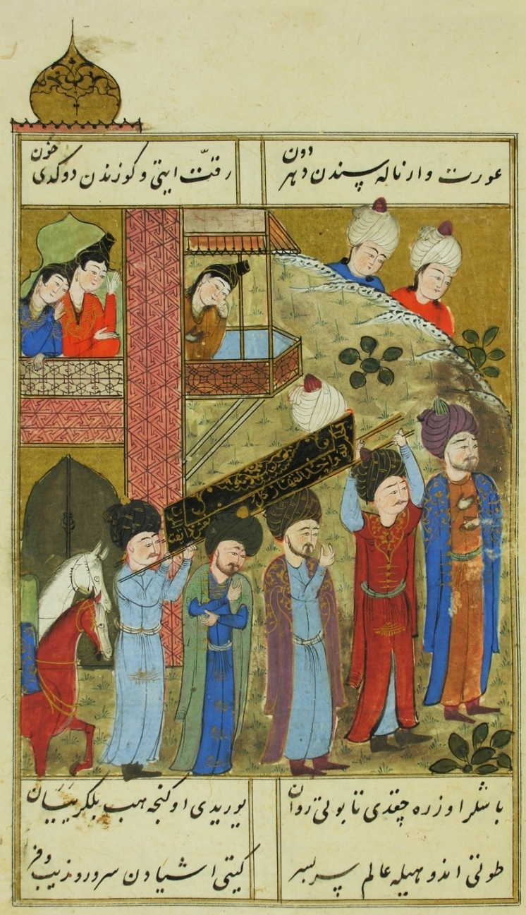 Trauerzug Sultan Bayezids II.